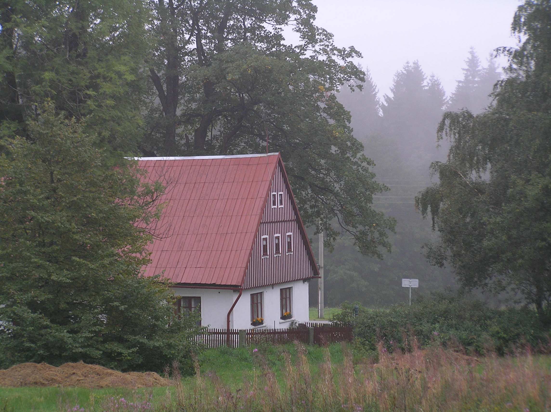 Dolní Černá Studnice (stará chalupa)